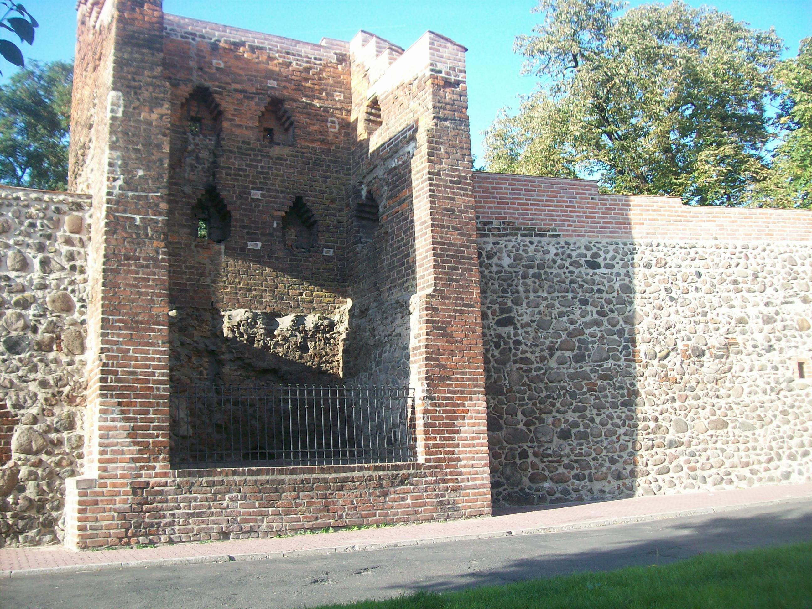 Gorzów Wielkopolski - mury obronne